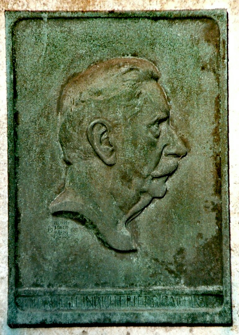 Das von Hermann Joachim Pagels anno 1908 geschaffene Relief Joachim Heinrich Friedrich Pagels